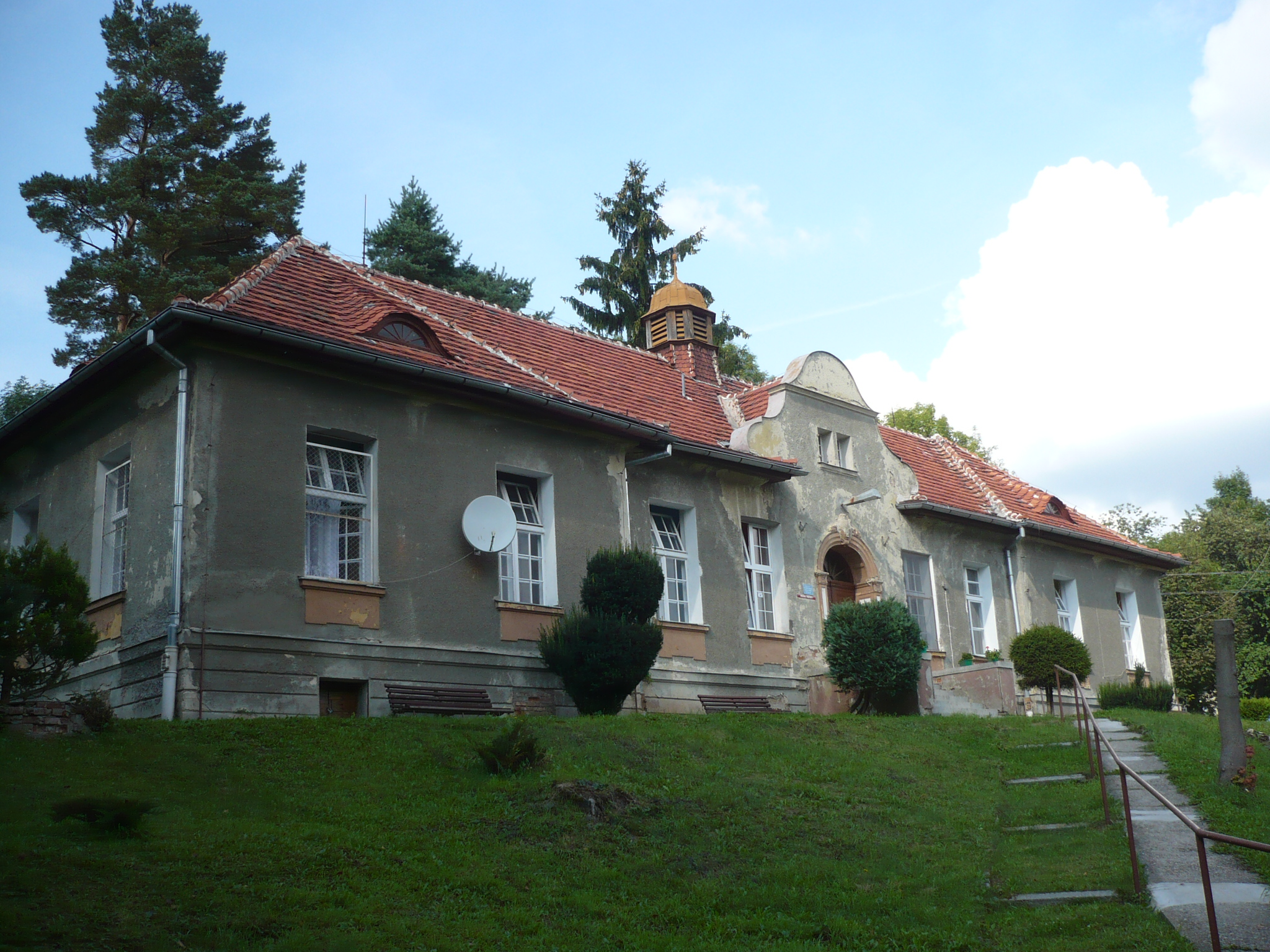 Nowa Ruda, ul. Szpitalna 2 - Szpital bracki (górniczy), 1911